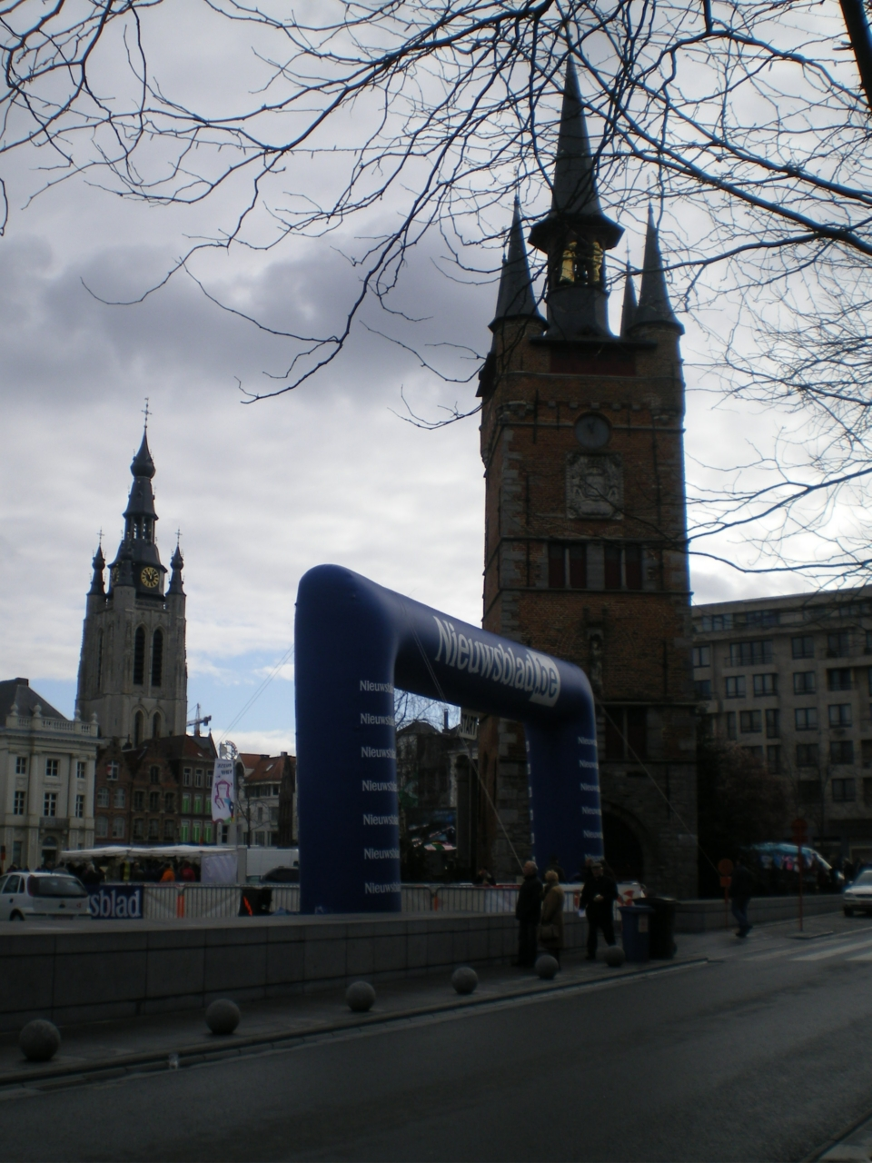 De 3-daagse van West-Vlaanderen in Kortrijk / Les 3 jours de Flandre-Occidentale à Courtrai